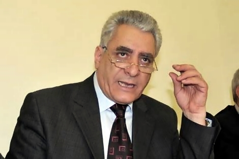 الحقوقي والسياسي الجزائري مصطفى بوشاشي